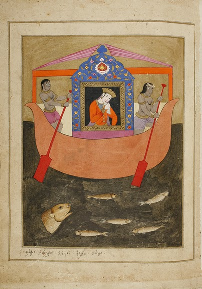 მინიატიურა წერეთლისეული ვეფხისტყაოსნიდან